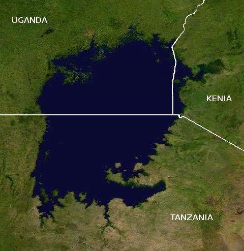 composizione di due immagini di pubblico dominio.